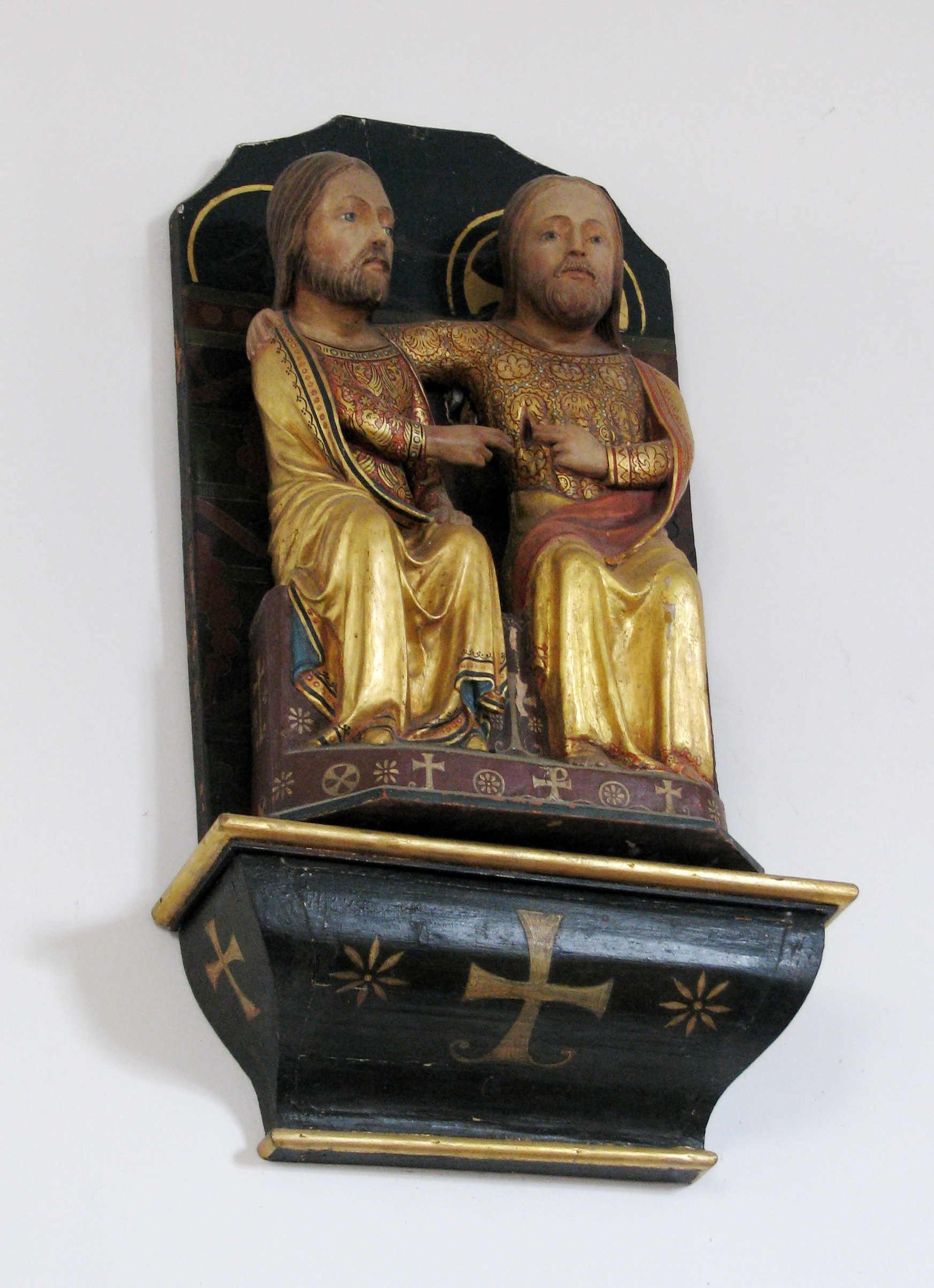 Landerzhofen, Ortsteil von Greding im Landkreis Roth, Filialkirche St. Thomas, Figurengruppe "Christus begegnet Thomas"